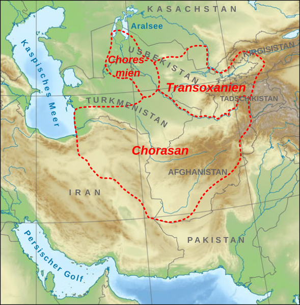 Karte der historischen Regionen Chorasan, Transoxanien und Choresmien auf einer Kartengrundlage mit aktuellen Staatsgrenzen.